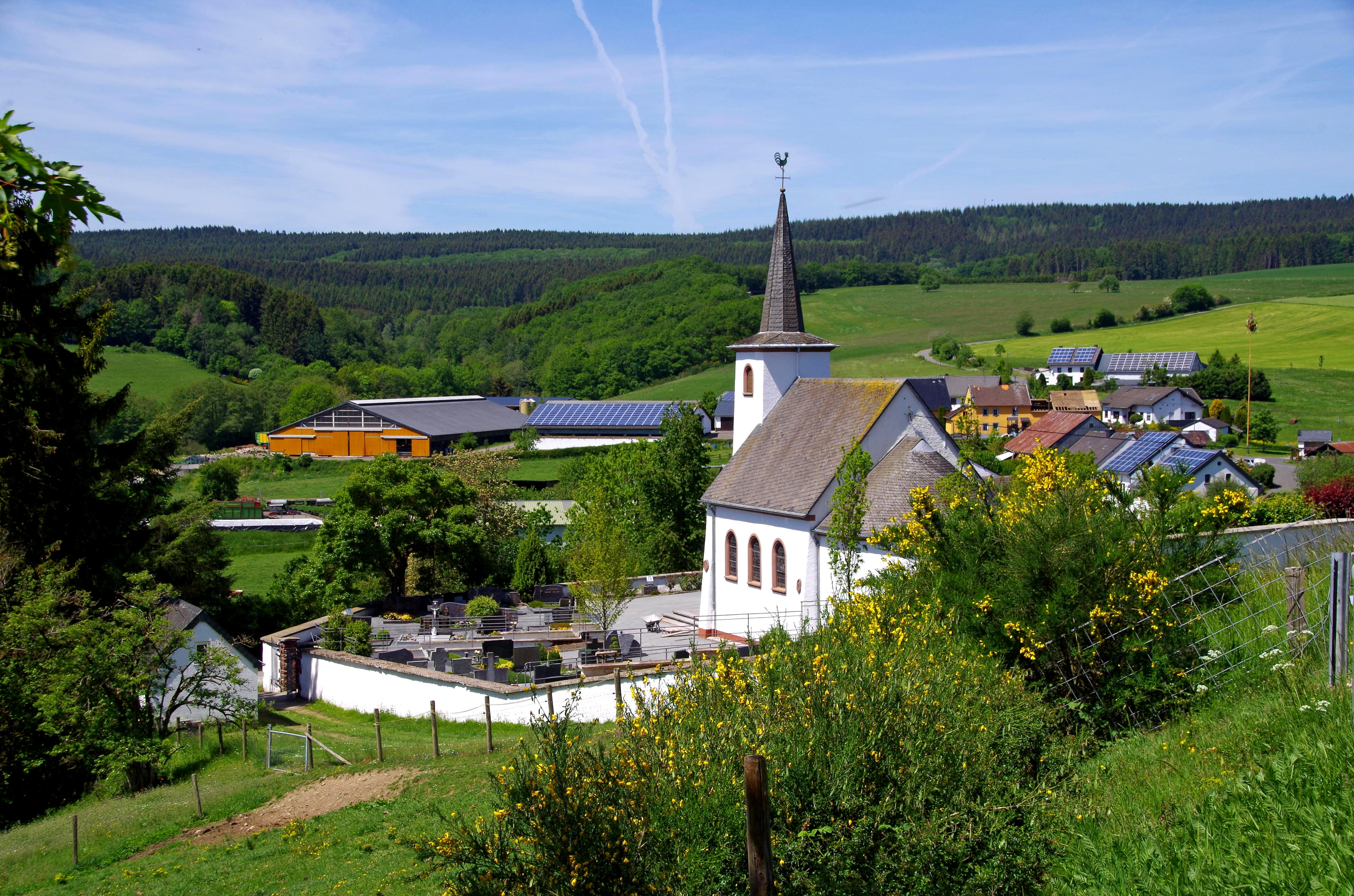 St. Lambertus (Hontheim-Sellerich) von Südosten